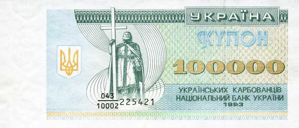 Украинские 100 000 купоно-карбованцев. Аверс.